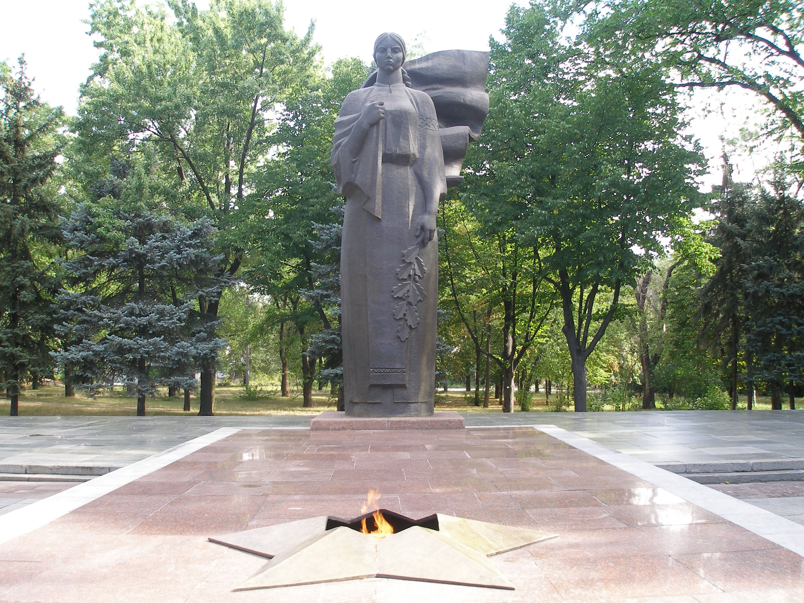 Меморіальний комплекс на честь радянських воїнів, загиблих під час форсування Дніпра, Запоріжжя, вул. Плотинна